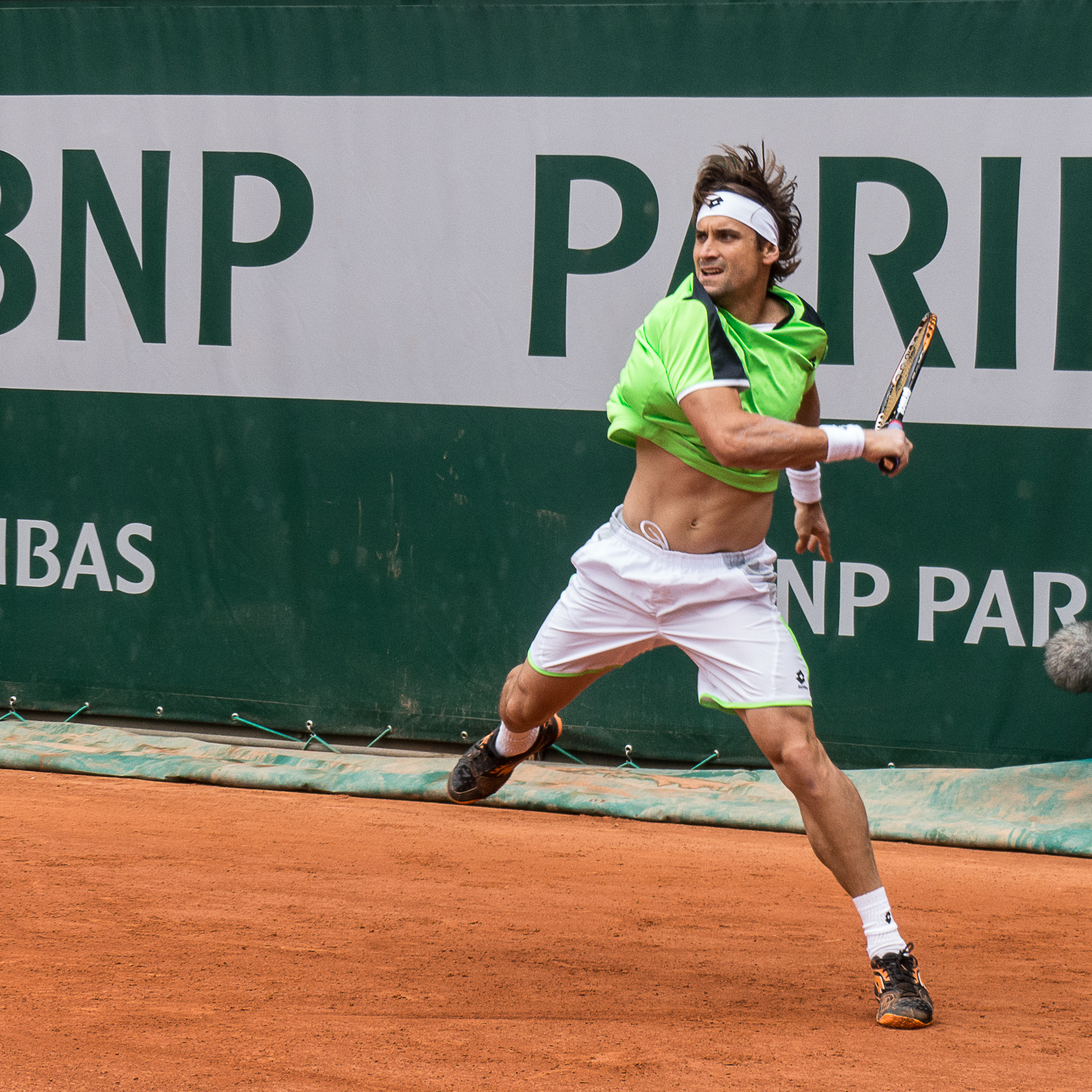 2ème tour Roland Garros 2013 : David Ferrer (ESP) def. Albert Montanes (ESP)